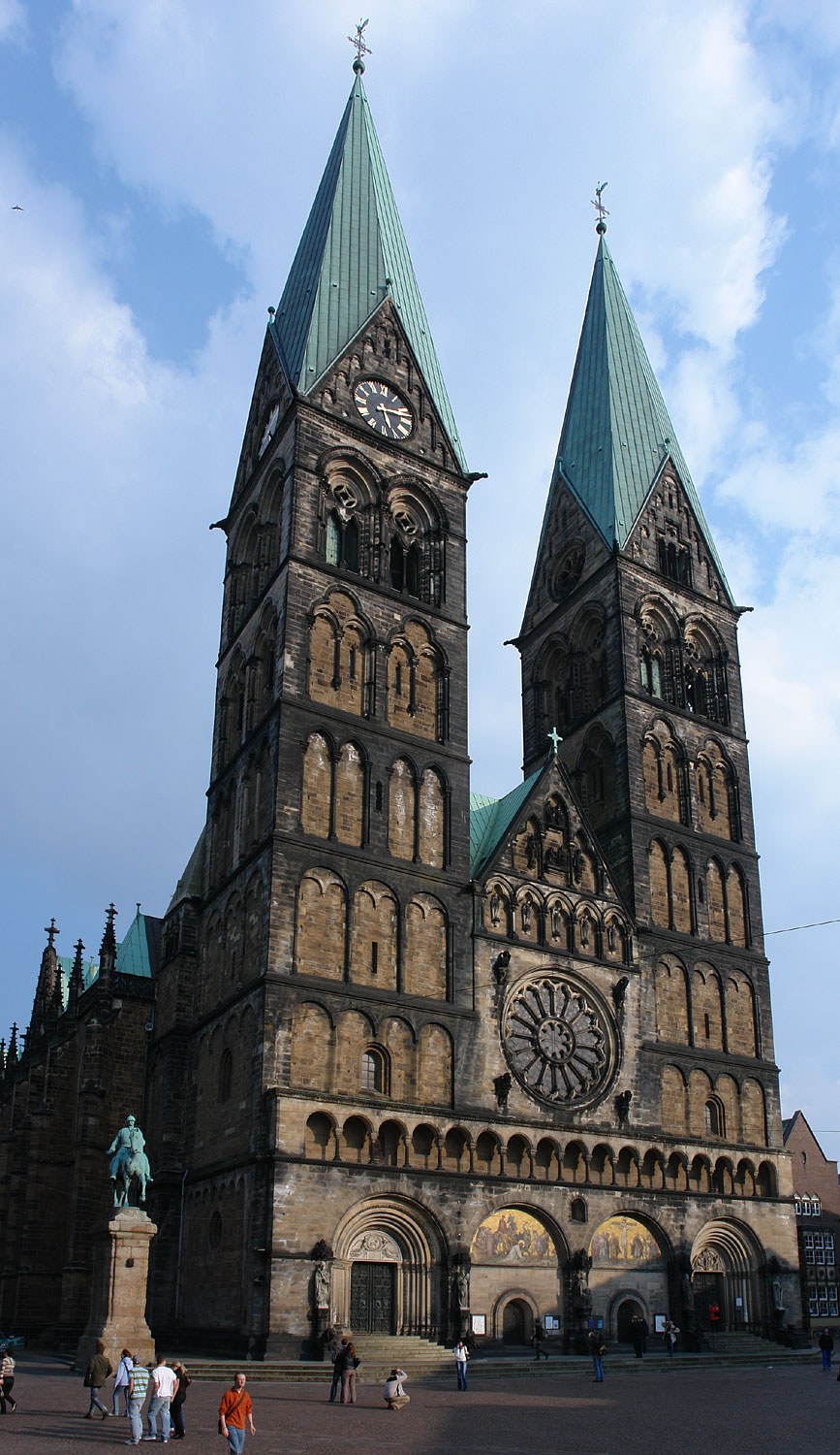 Bremer St. Petri Dom mit Bismarck-Denkmal Der Dom ist ein geschütztes Kulturdenkmal in der Freien Hansestadt Bremen, mit der Nr. 0314 beim Landesamt für Denkmalpflege registriert.